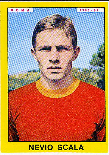 Nevio Scala che indossa la maglia del Roma